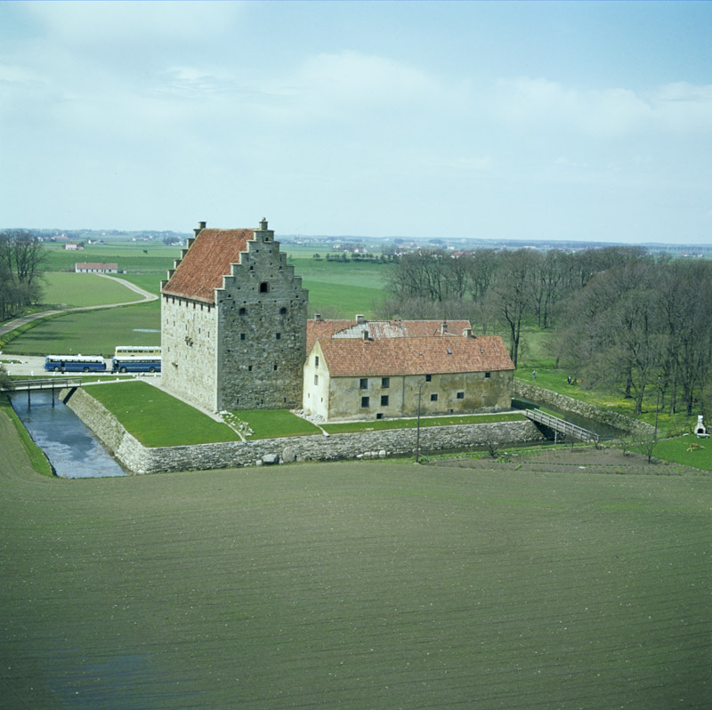 Den medeltida borgen från sydöst. Motiv: Vallby 5:1 Nyckelord: Flygbilder Kategori: Borg Den medeltida borgen från sydöst. Vallby 5:1.